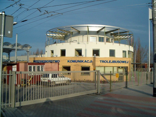 Zajezdnia PKT Gdynia